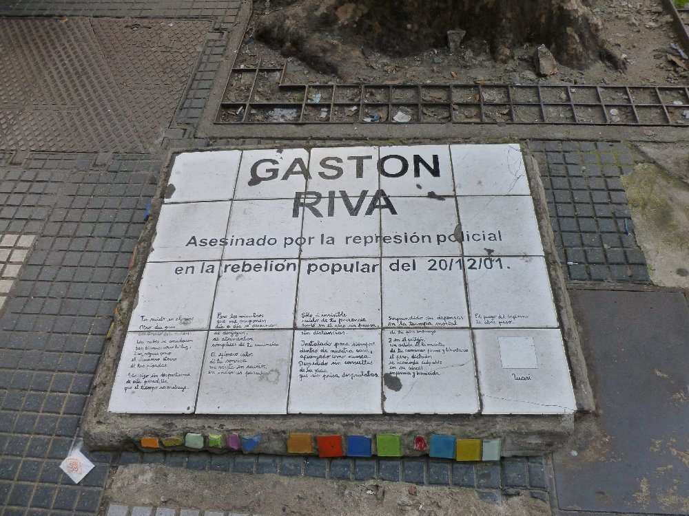 Placa en memoria del asesinato de Gastón Riva el 20 de diciembre de 2001 en la Masacre de Plaza de Mayo. Ubicada en Avenida de Mayo 895. Buenos Aires.